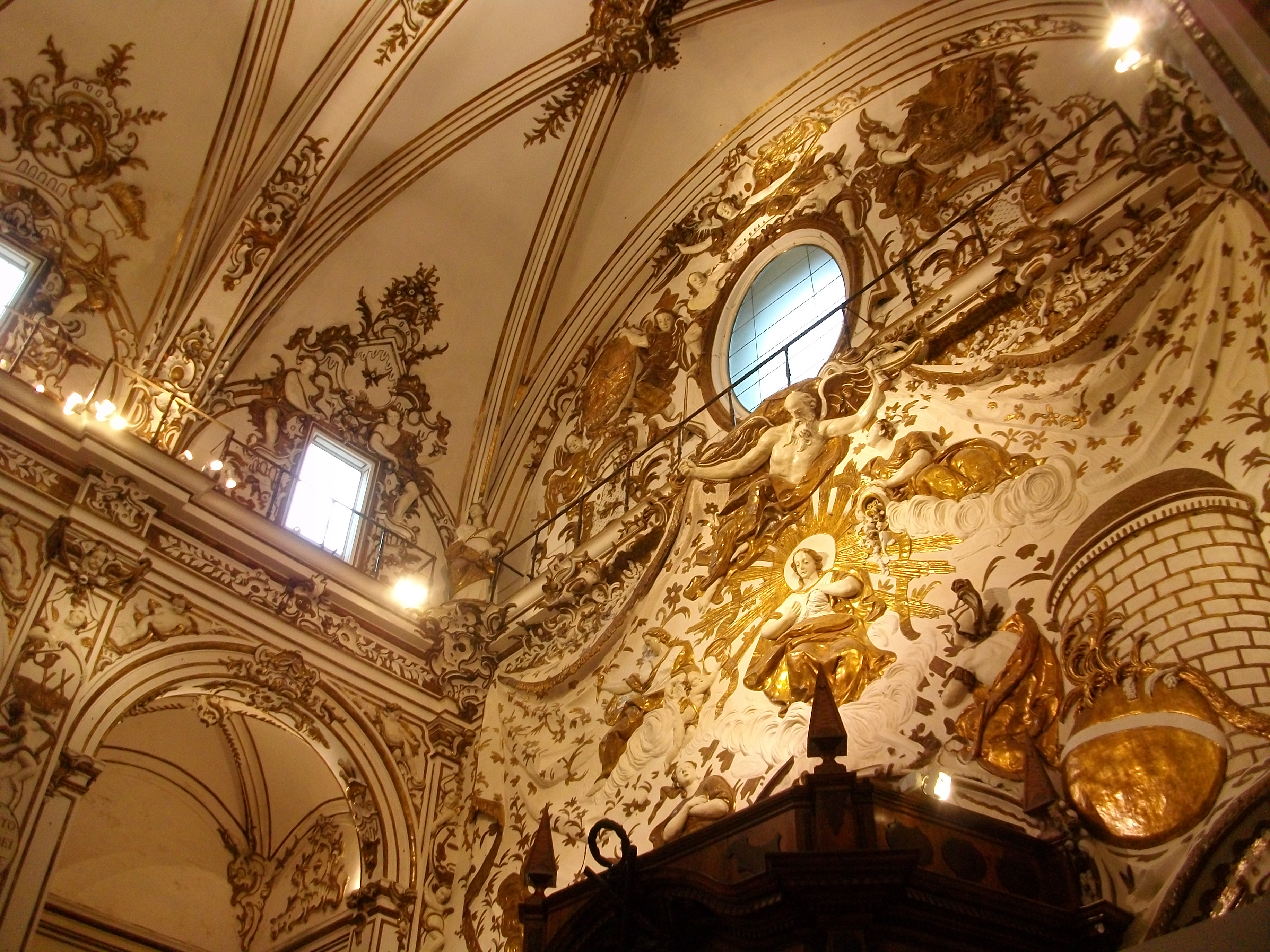 Església de Sant Joan de la Creu (abans de Sant Andreu), vista de la paret dels peus de la nau amb decoració d'estil rococó. València.